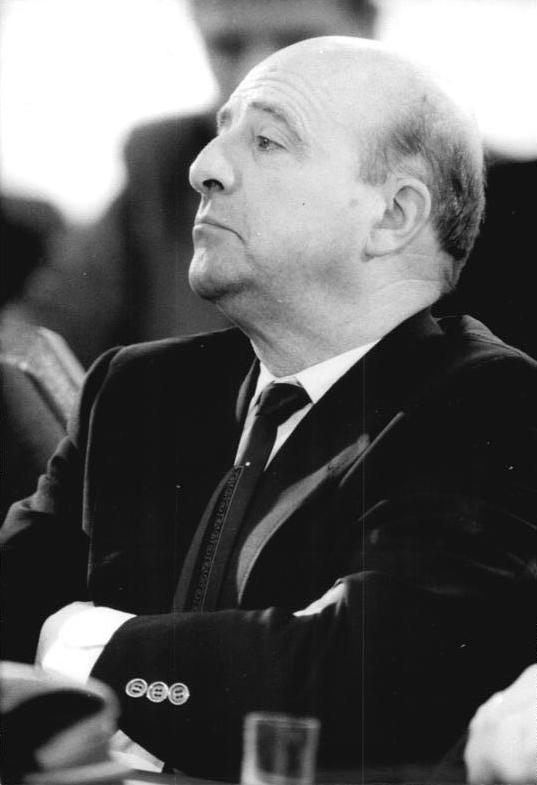 ADN-ZB Mittelstädt-24.1.90-zei-Berlin: Dr. Wolfgang Ullman, Demokratie jetzt. Stammabzug darf nicht aus dem Hause